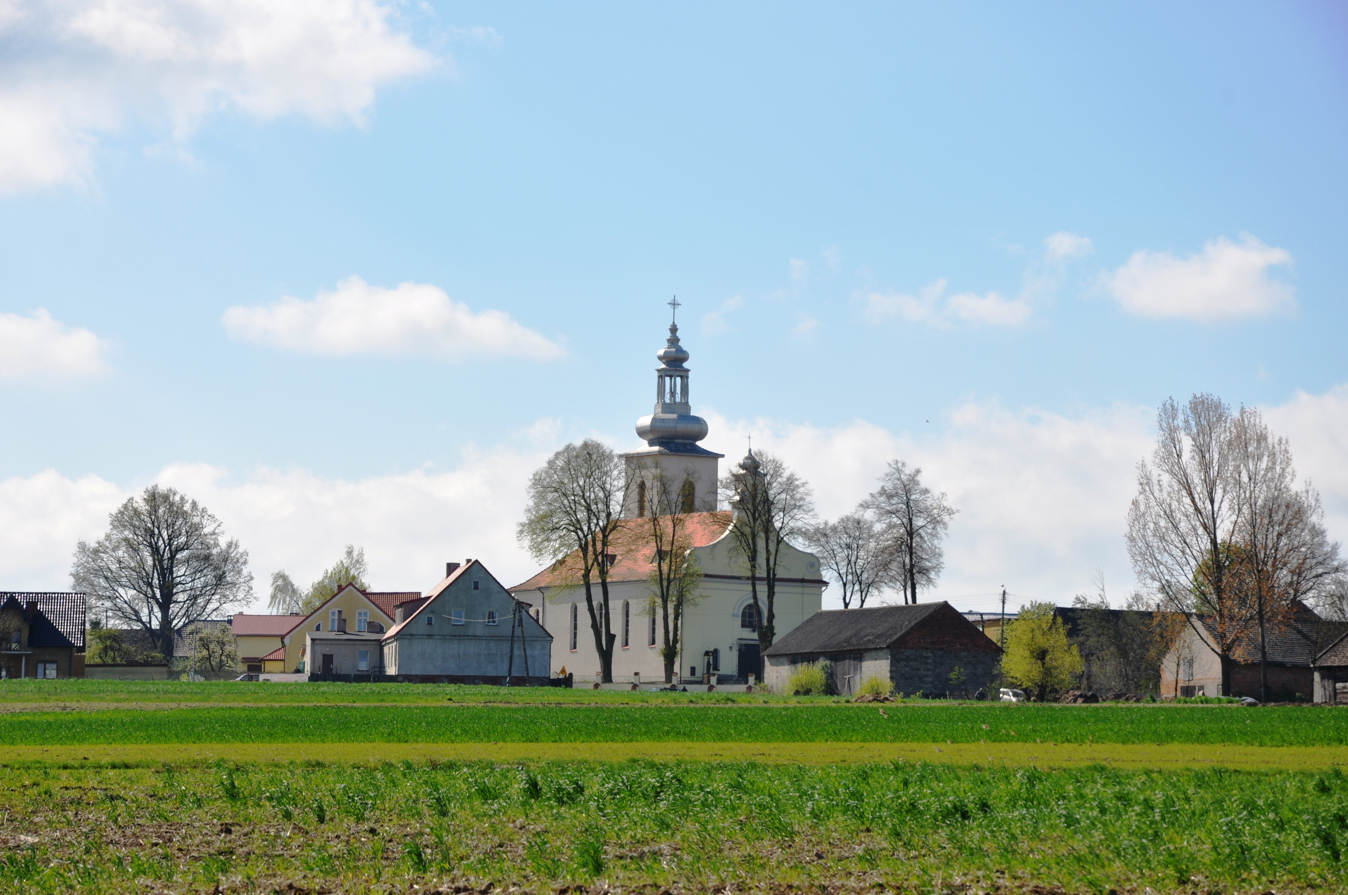 L'église Saint Laurent de Chynowa, en 2016.